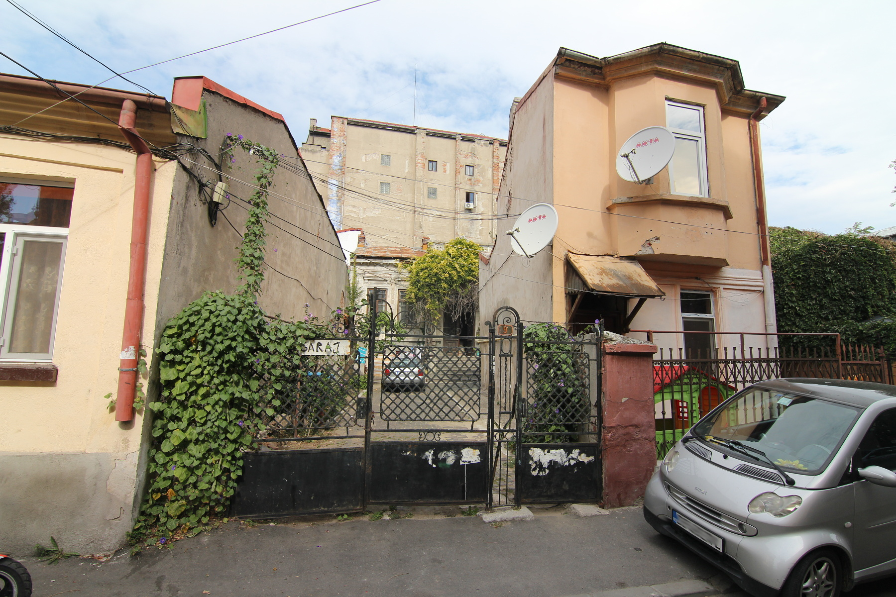 Casă pe Stelea Spătarul